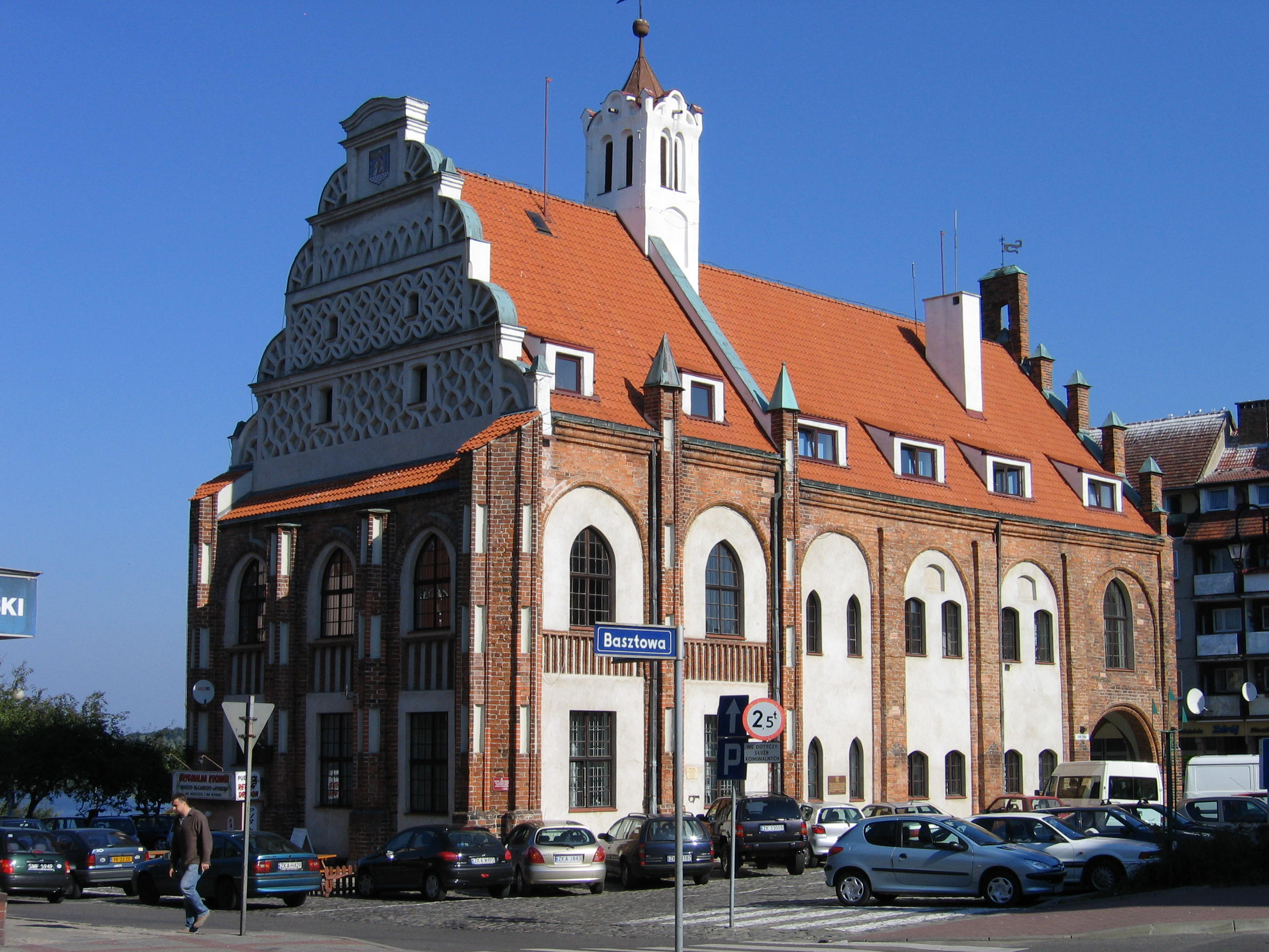 ratusz Kamień Pomorski